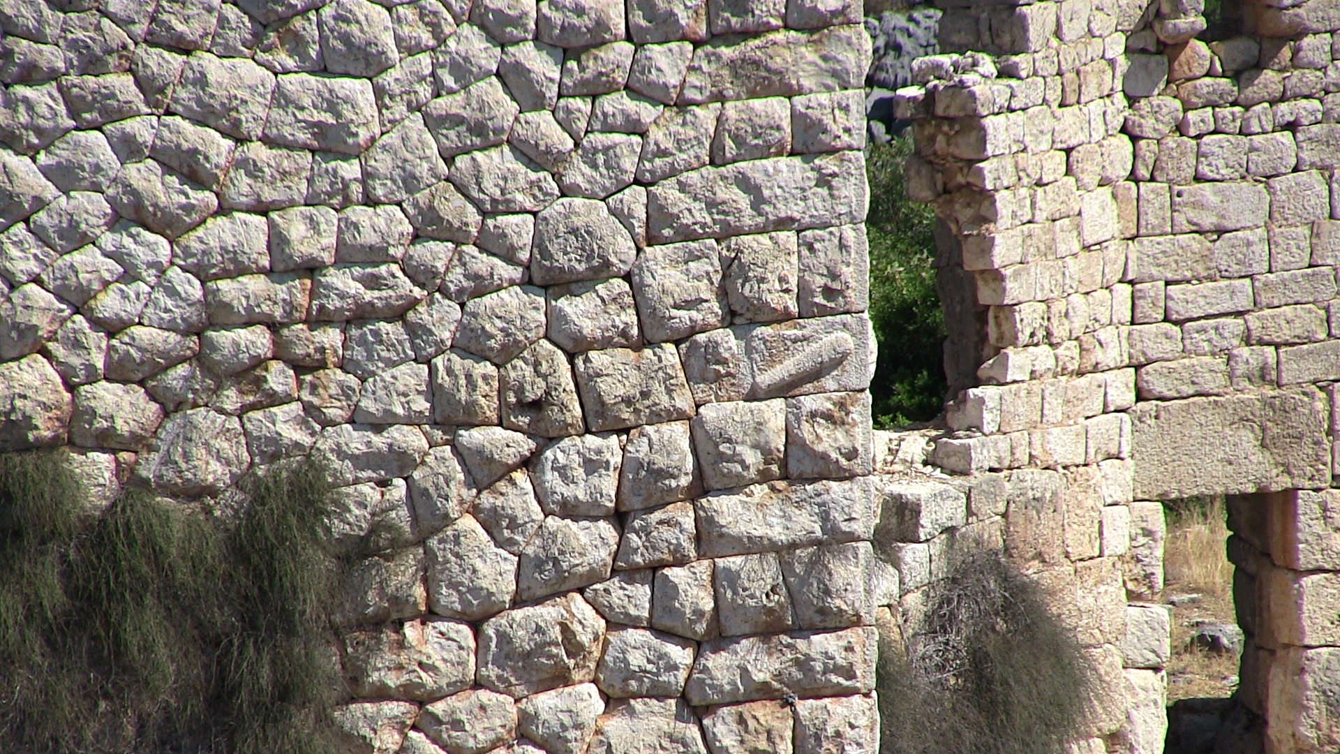 Hisarın, römisch-frühbyzantinische Siedlung im Rauhen Kilikien, Südtürkei, Befestigungsanlage mit Olbischem Zeichen (Keule) von Westen